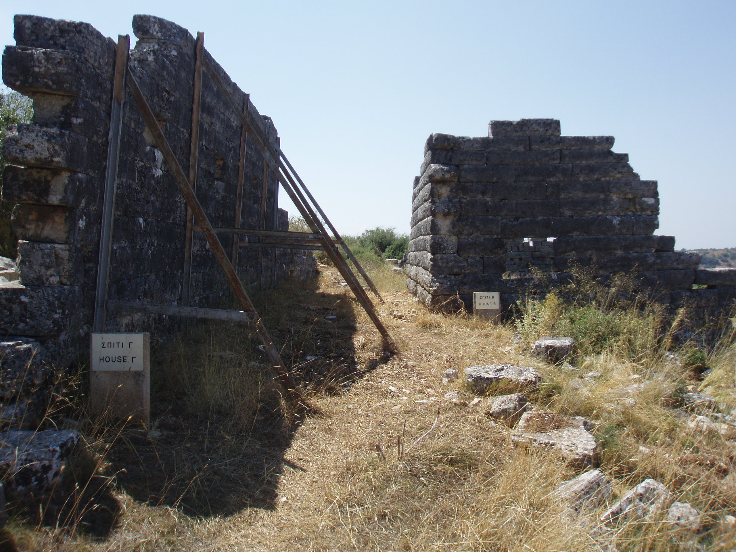 αρχαίον Όρραον